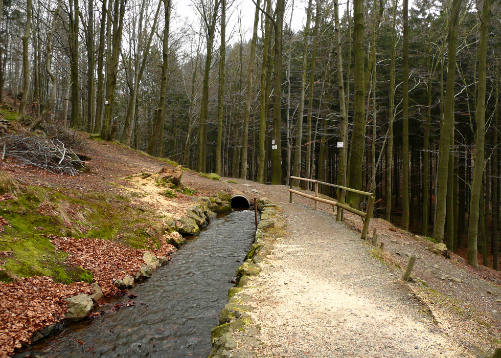 Zuleitung Radaufall